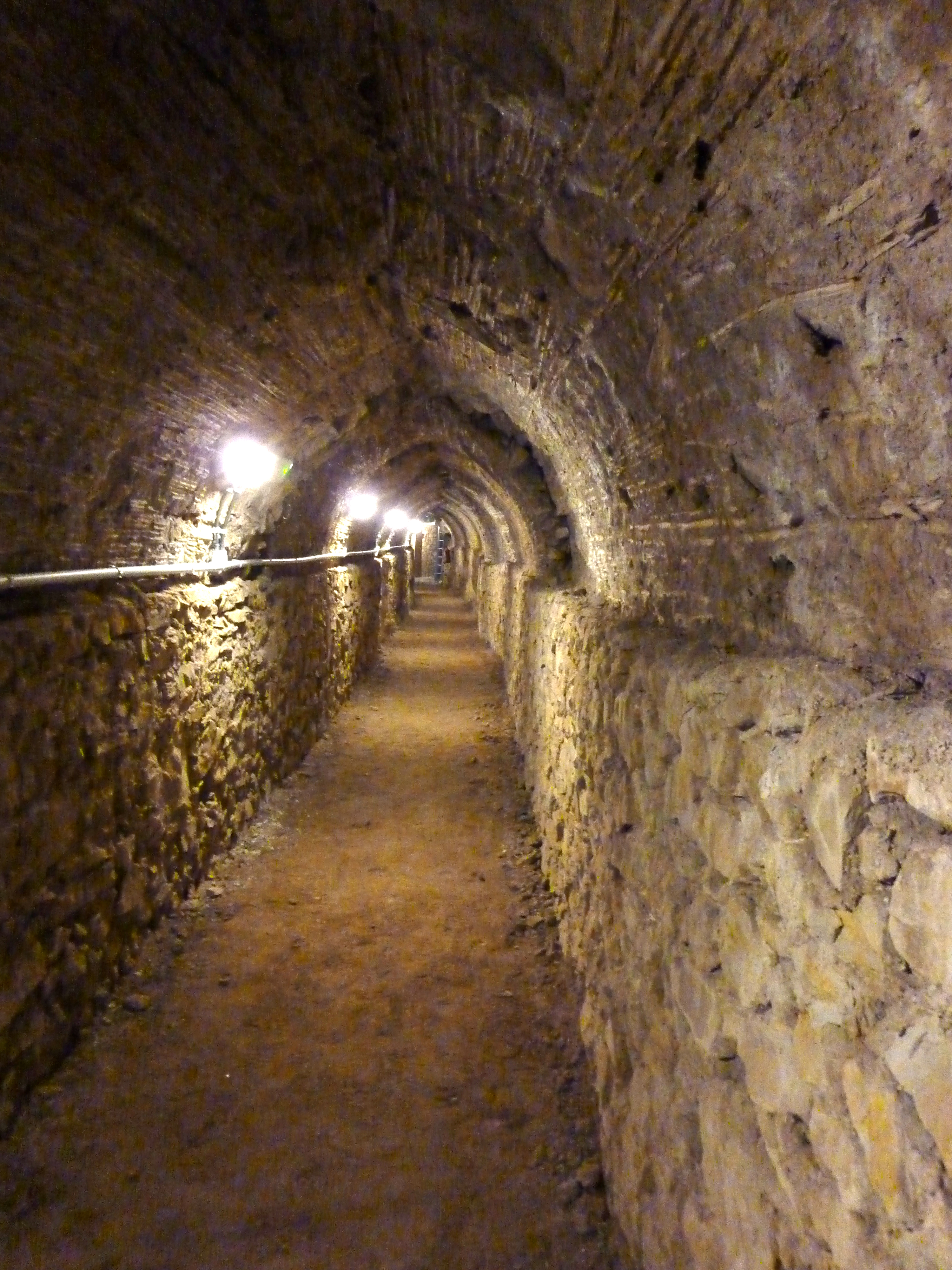 Tram de la mina d'aigua de Torroella avui en desús. Aquest tram visitable presenta un encanyissat a la part superior